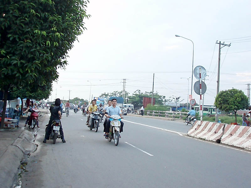 Nút giao thông tại Cầu Ông Bố, thị xã Thuận An, tỉnh Bình Dương, Việt Nam